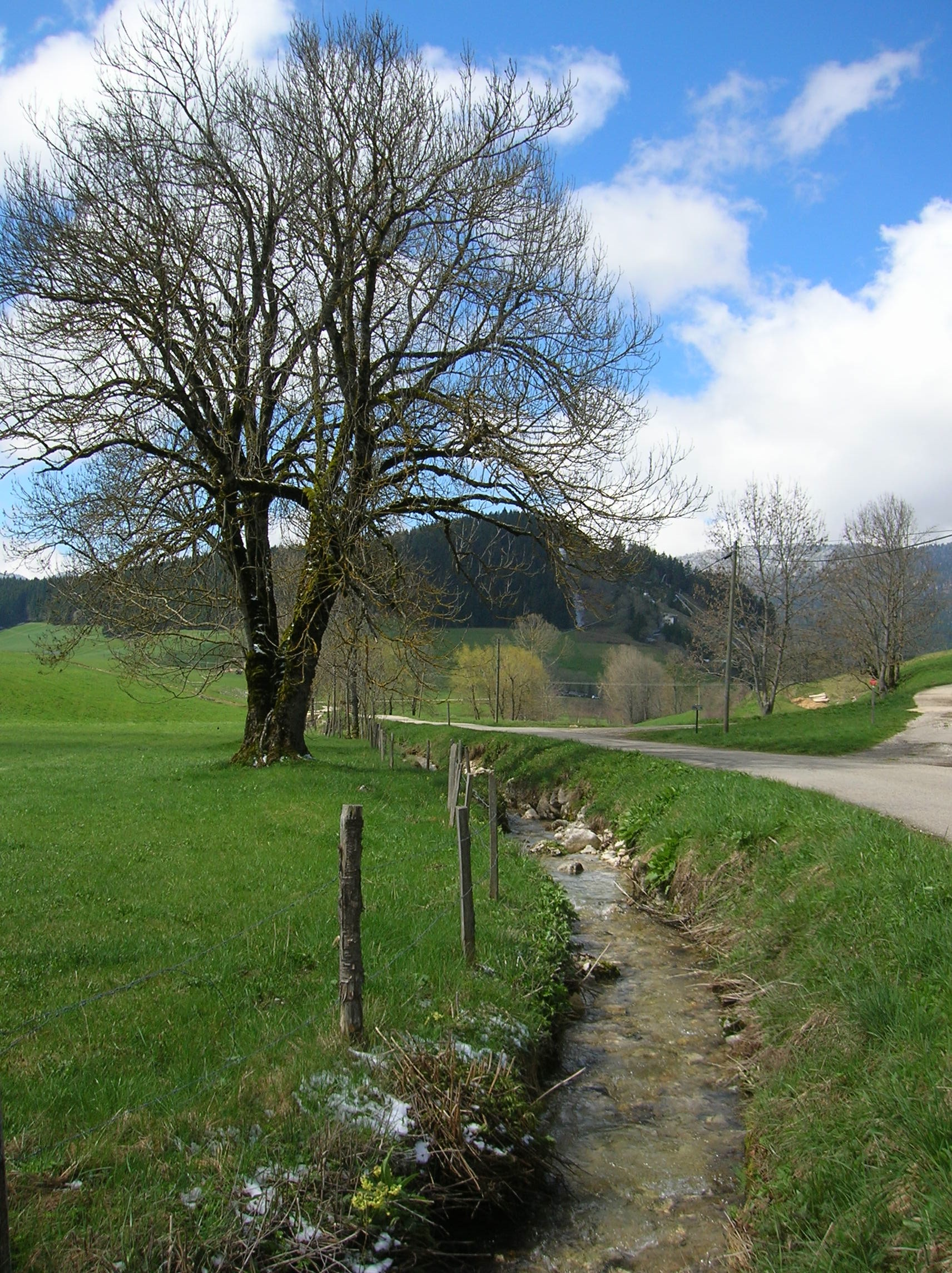 ruisseau du Bouchet. randonnée de Autrans à l'ENS La Molière et Sornin, par le pas de Bellecombe et le pas de l'Ours, vers Engins. Autrans-Méaudre-en-Vercors, Isère, AuRA, France.